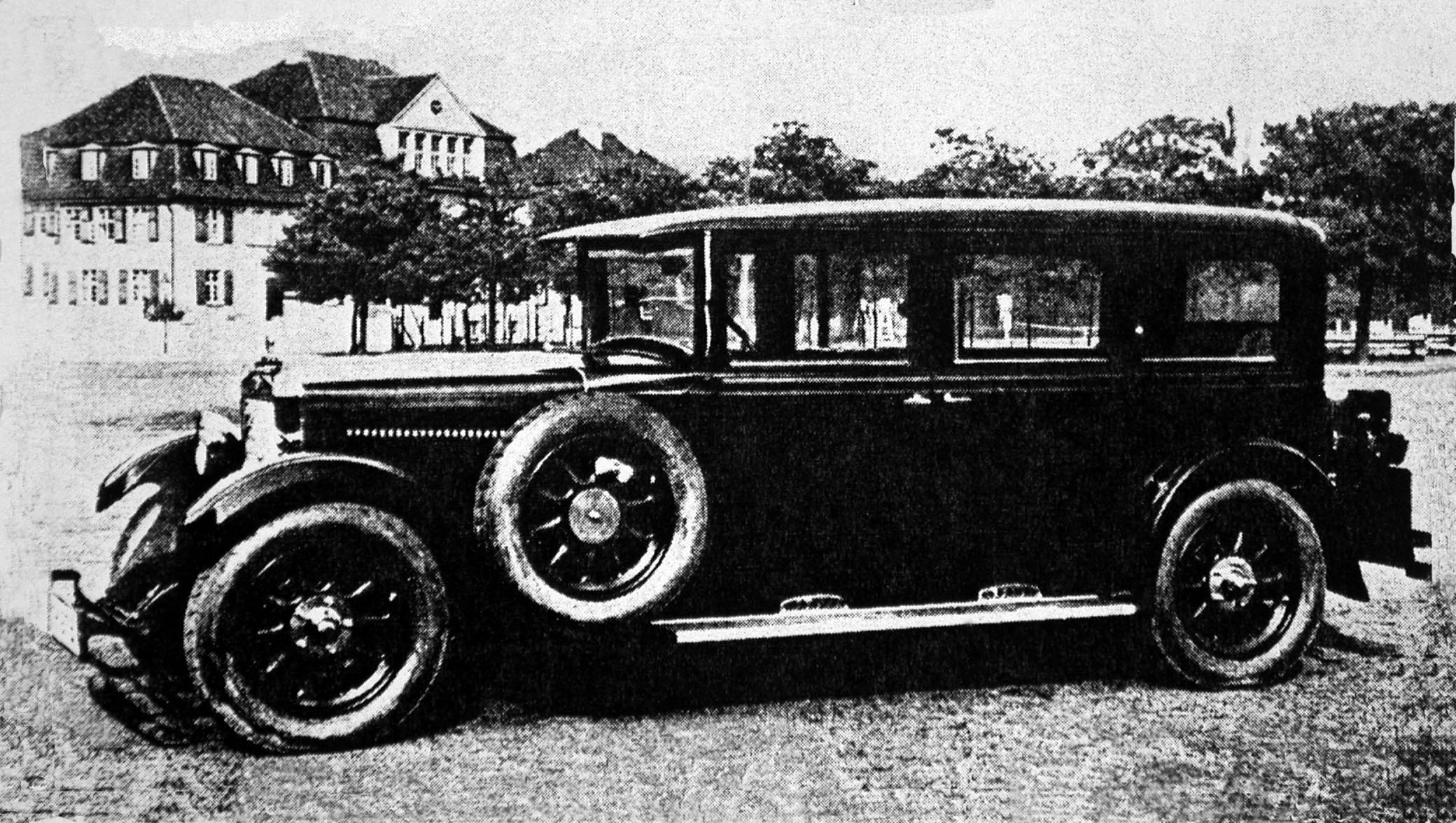 Selve 12/50 Sélecta, limousine pullman 7 places, 1928